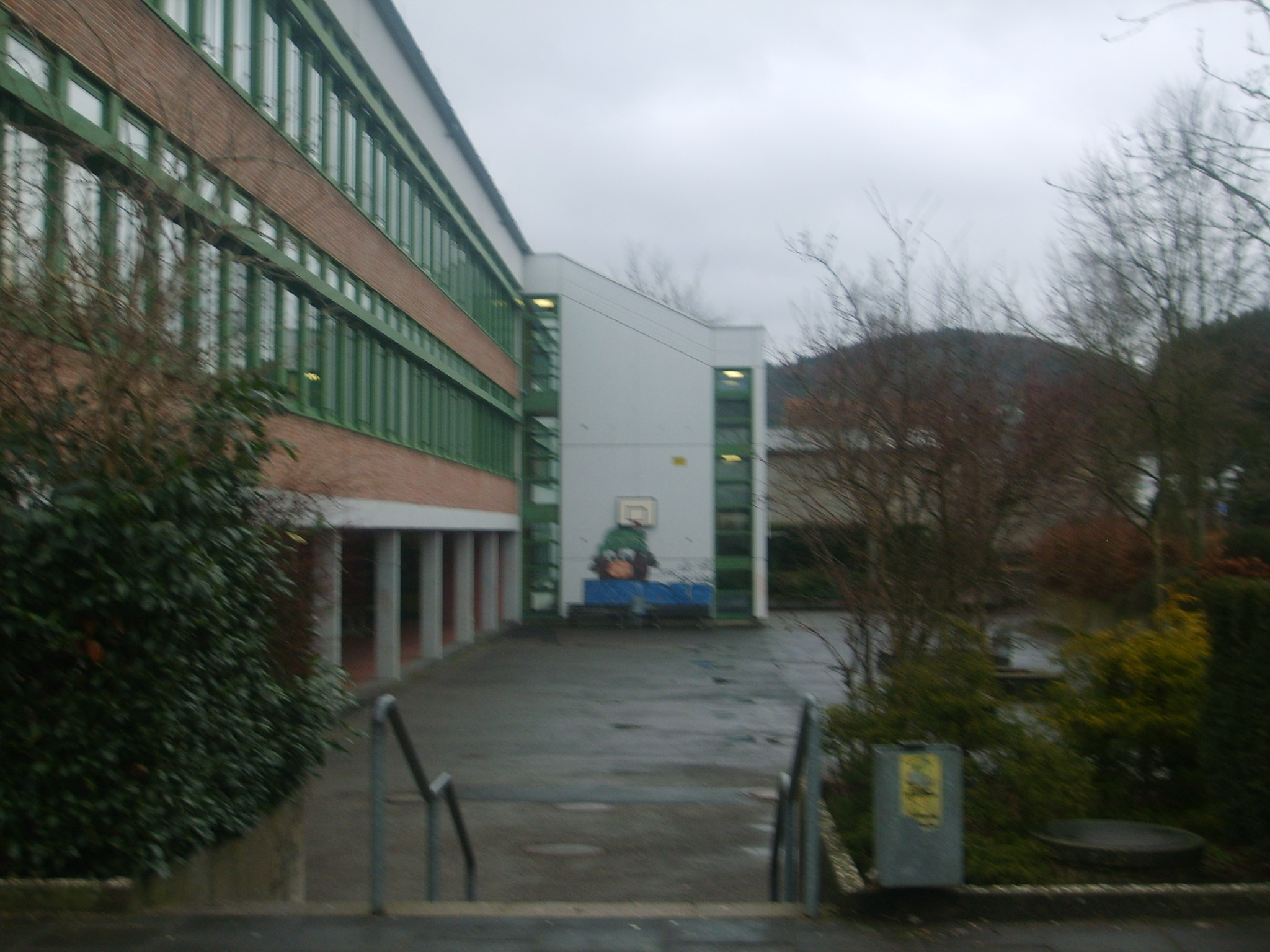 Der untere Teil des Schulhofs